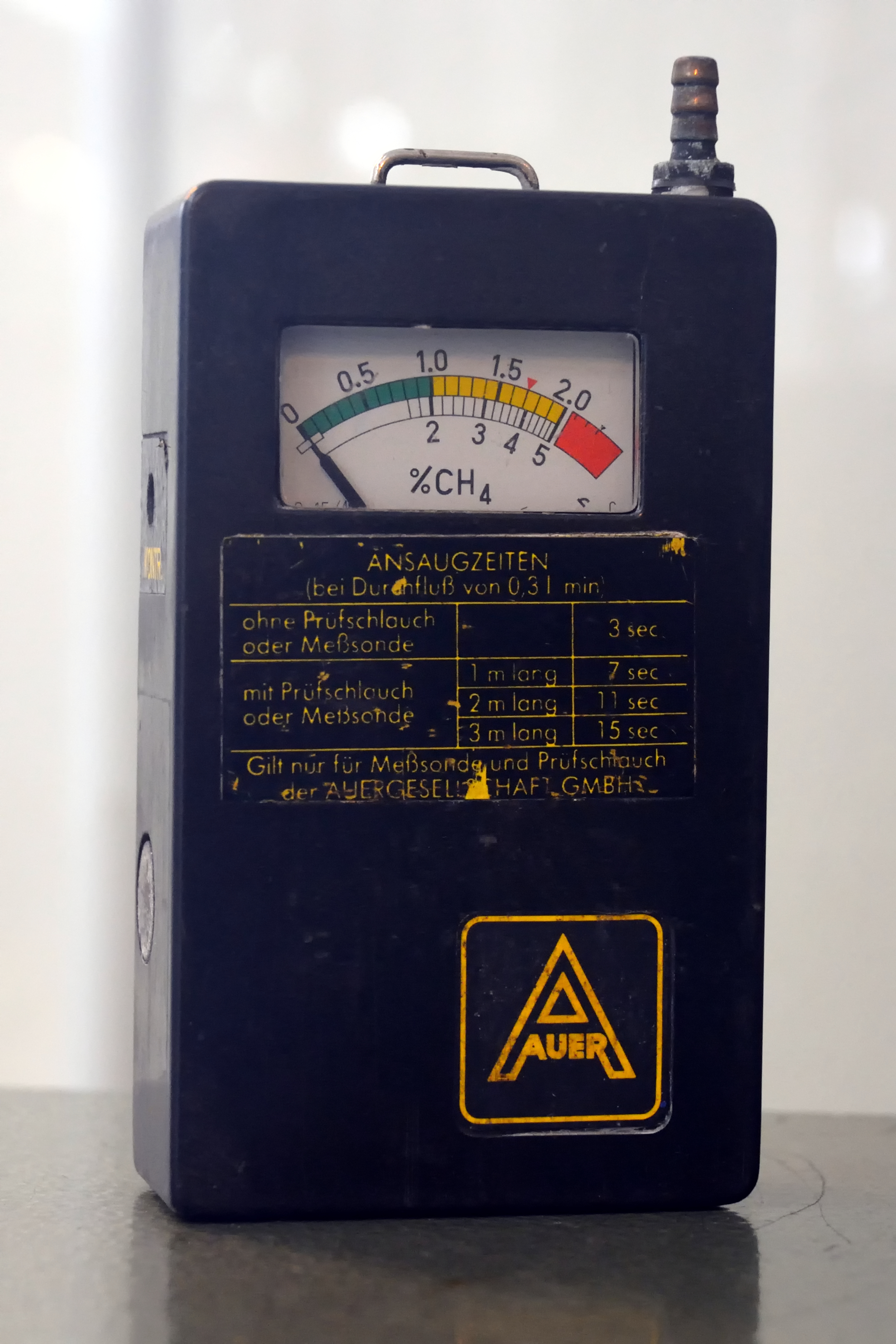 Impressionen von der Zeche "Zollern 2/4" in Dortmund. Hier: Messgerät für die Methankonzentration der Luft